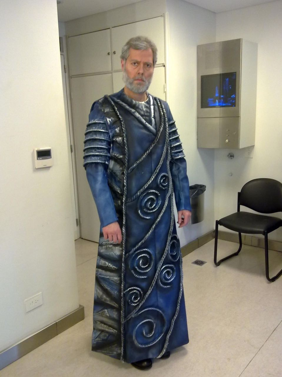 Leonardo Estévez como Teseo en Fedra